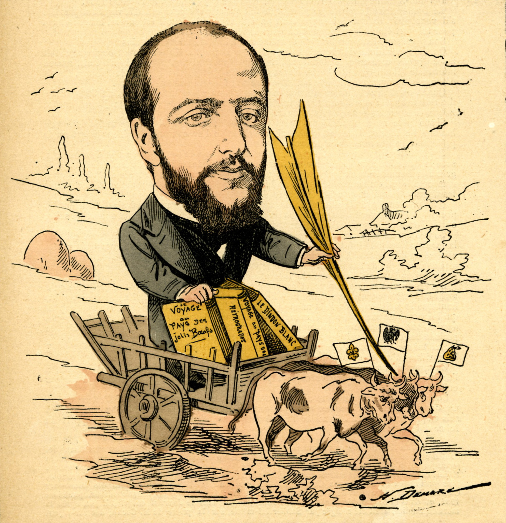 Caricature d'Edmond Thiaudière (1837-1930) par Henri Demare